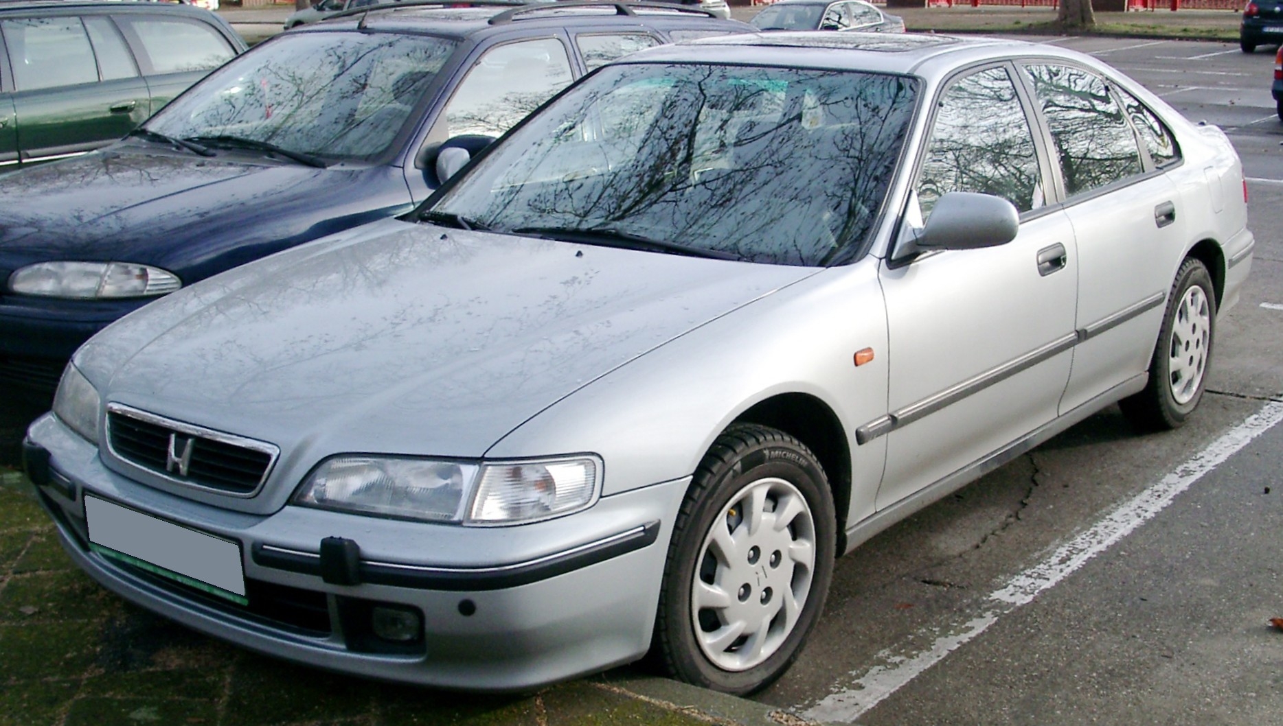 Honda Accord, 5. Generation